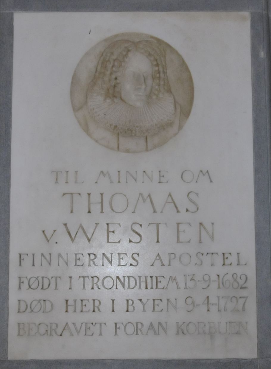 Gedenktafel an Thomas von Westen im Nidaros-Dom in Trondheim